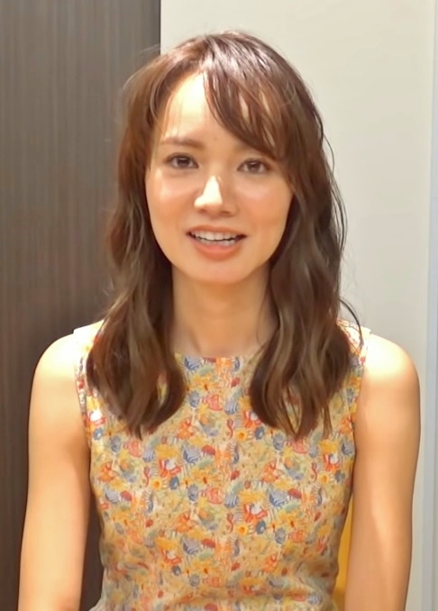 ringolfのYouTube動画に出演する三枝こころ